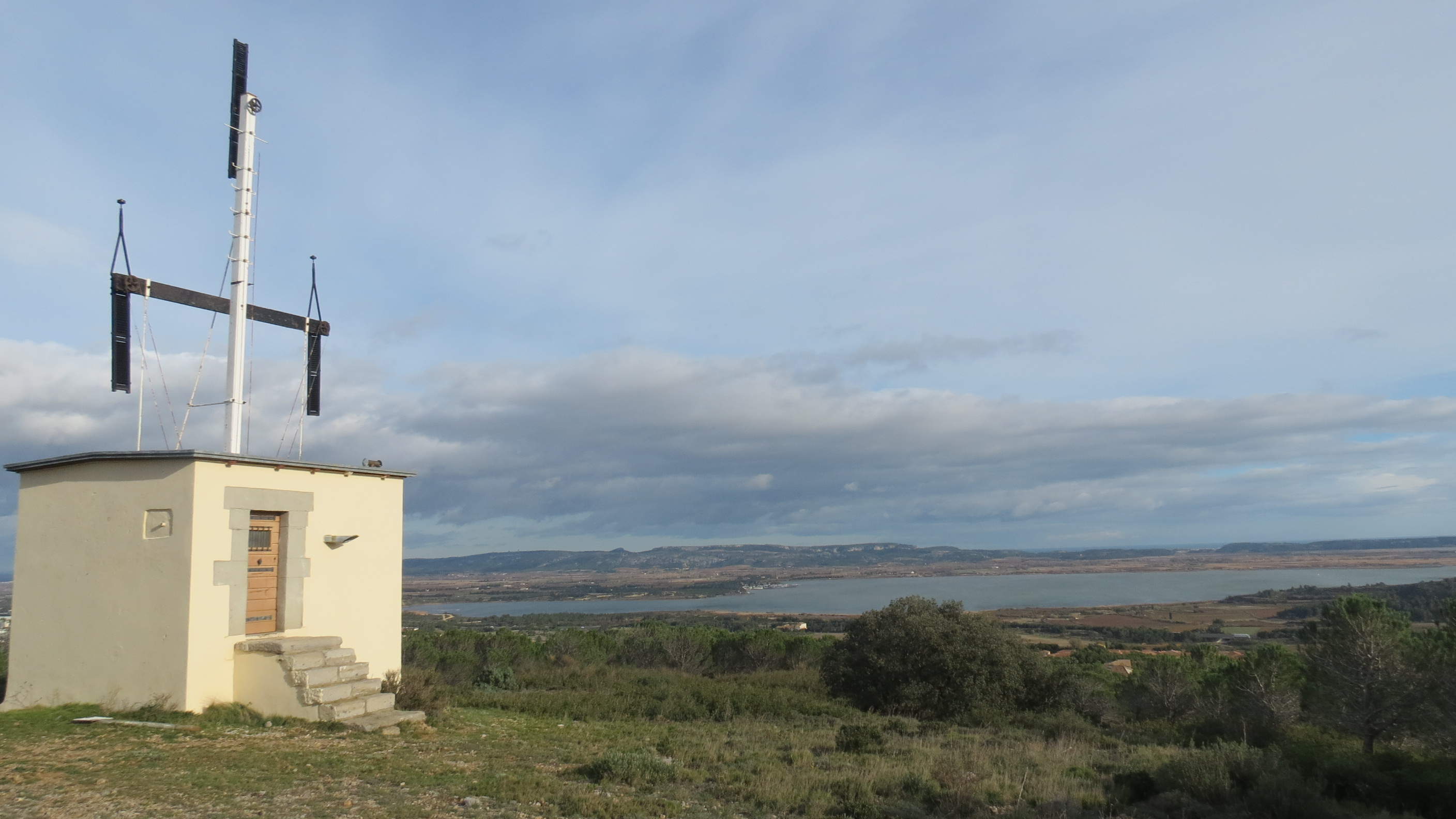 Télégraphe Chappe, tour Jonquières, Narbonne Languedoc-Roussillon.